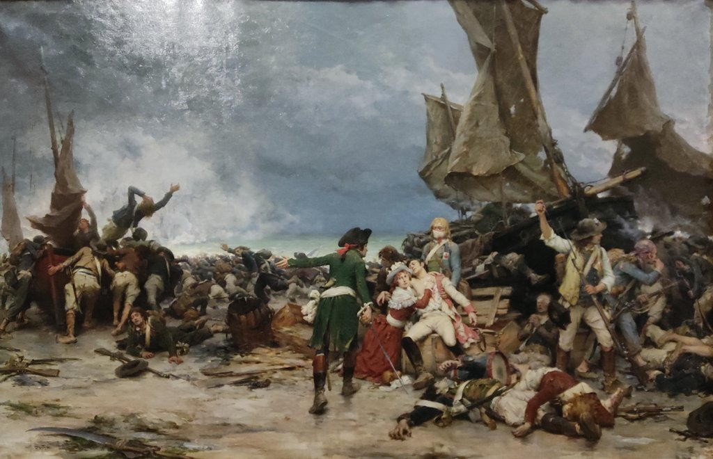 Episode de la déroute de Quiberon